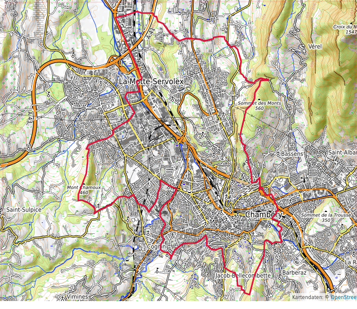 carte réalisée sur umap This map may be incomplete, and may contain errors. Don't rely solely on it for navigation.